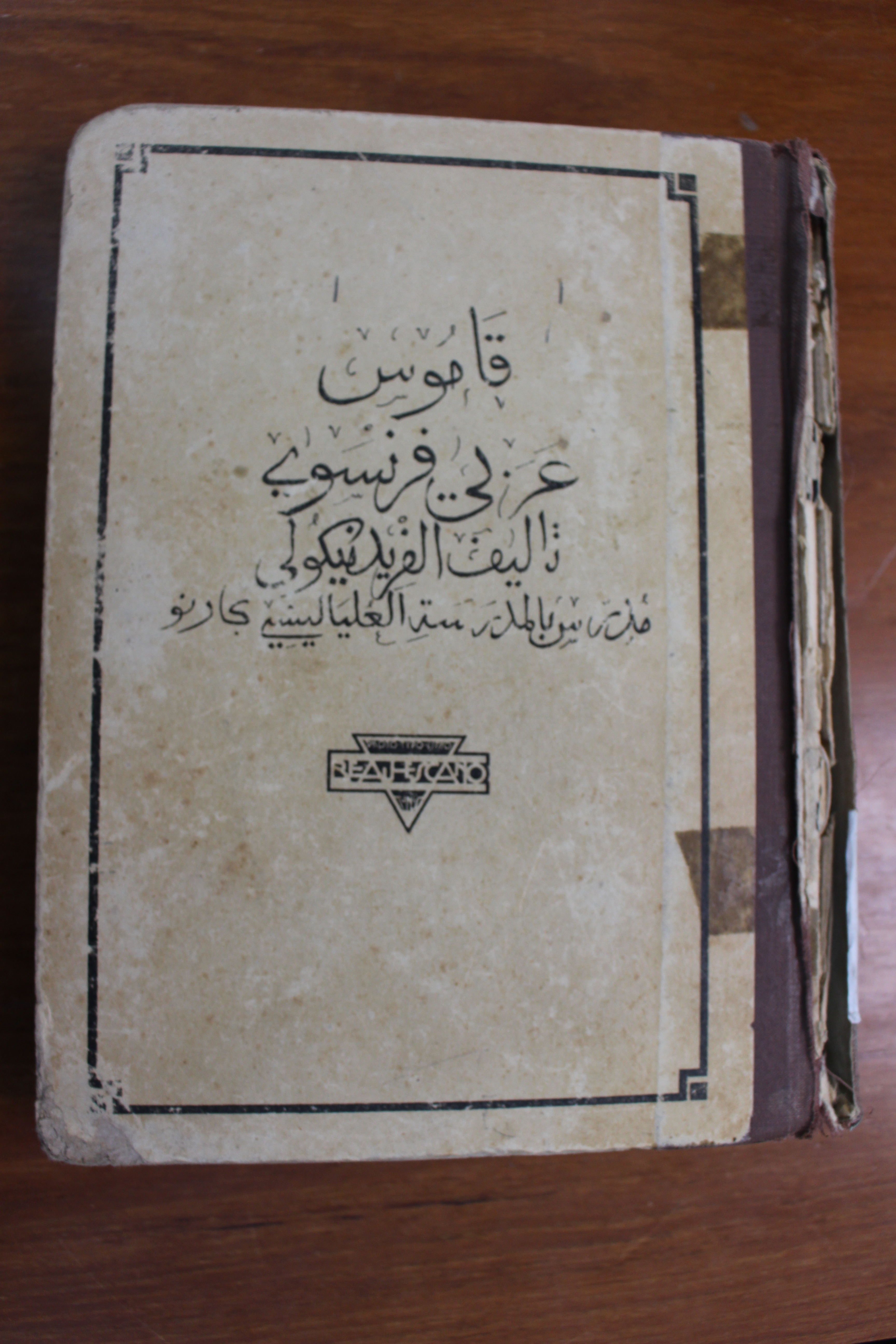 Dernière page de couverture